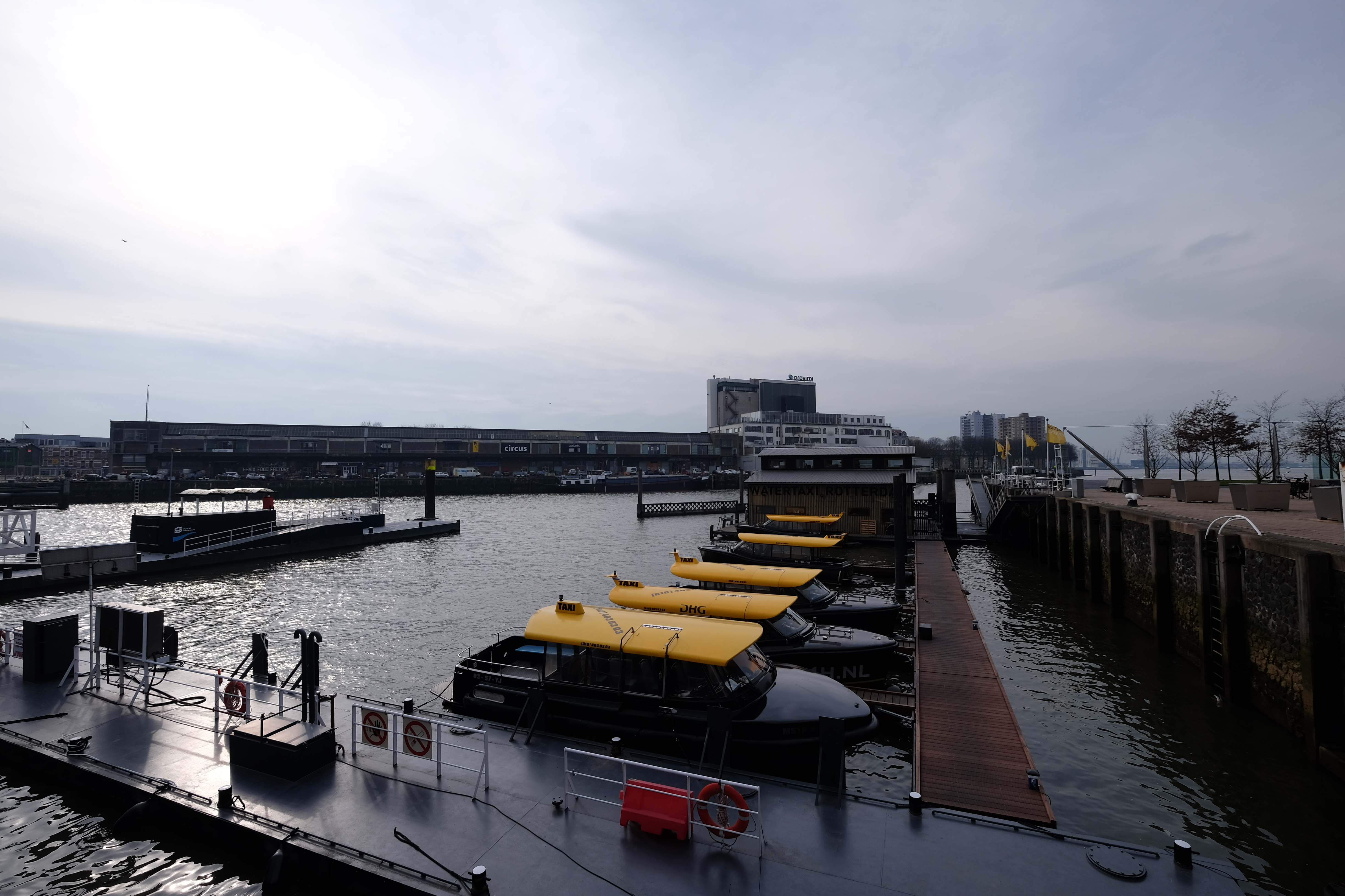 Kop van Zuid, Rotterdam, Netherlands